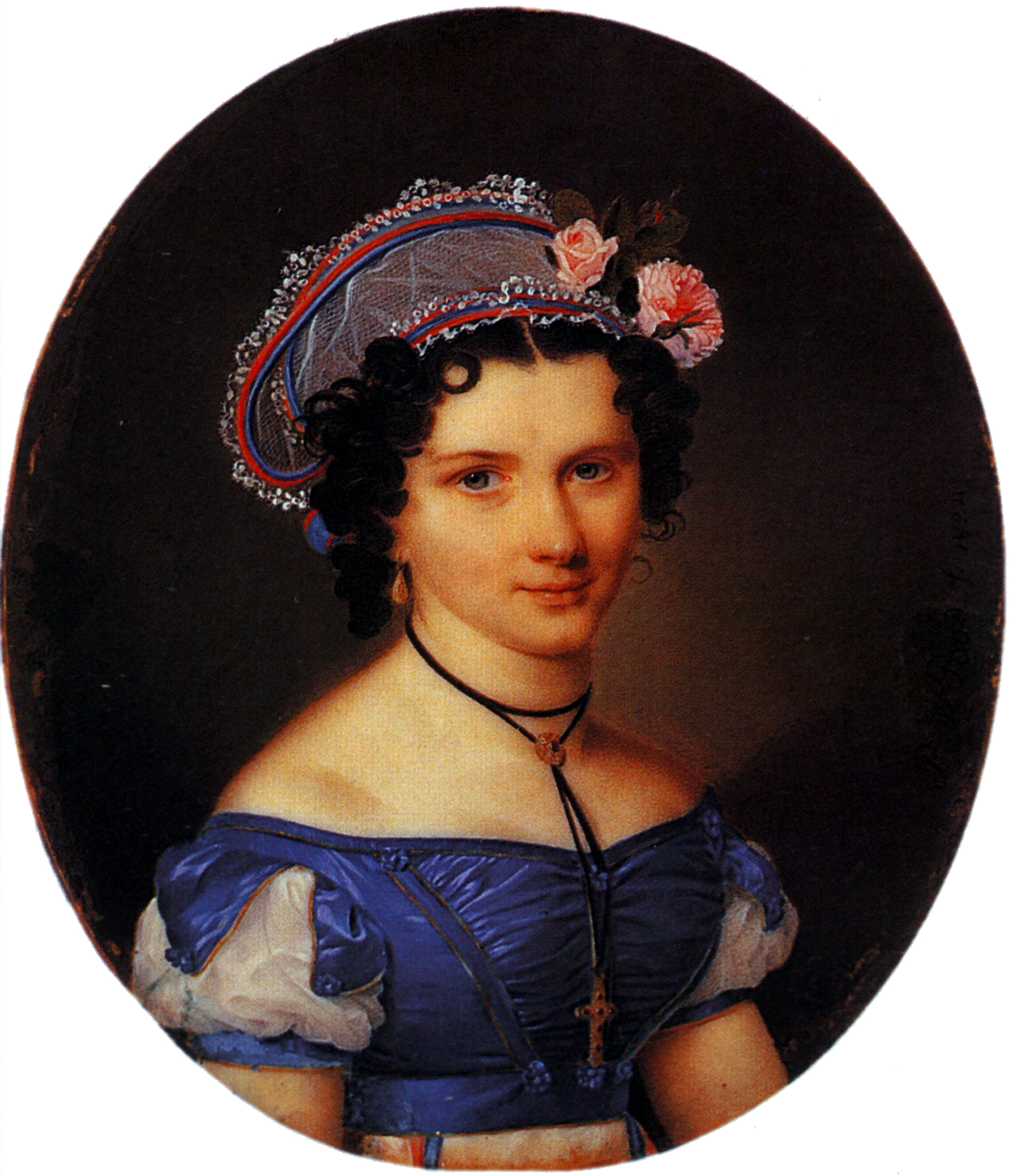 Портрет Е.А. Телешевой в роли Луизы из балета "Дезертир" на музыку П.А.Монсиньи